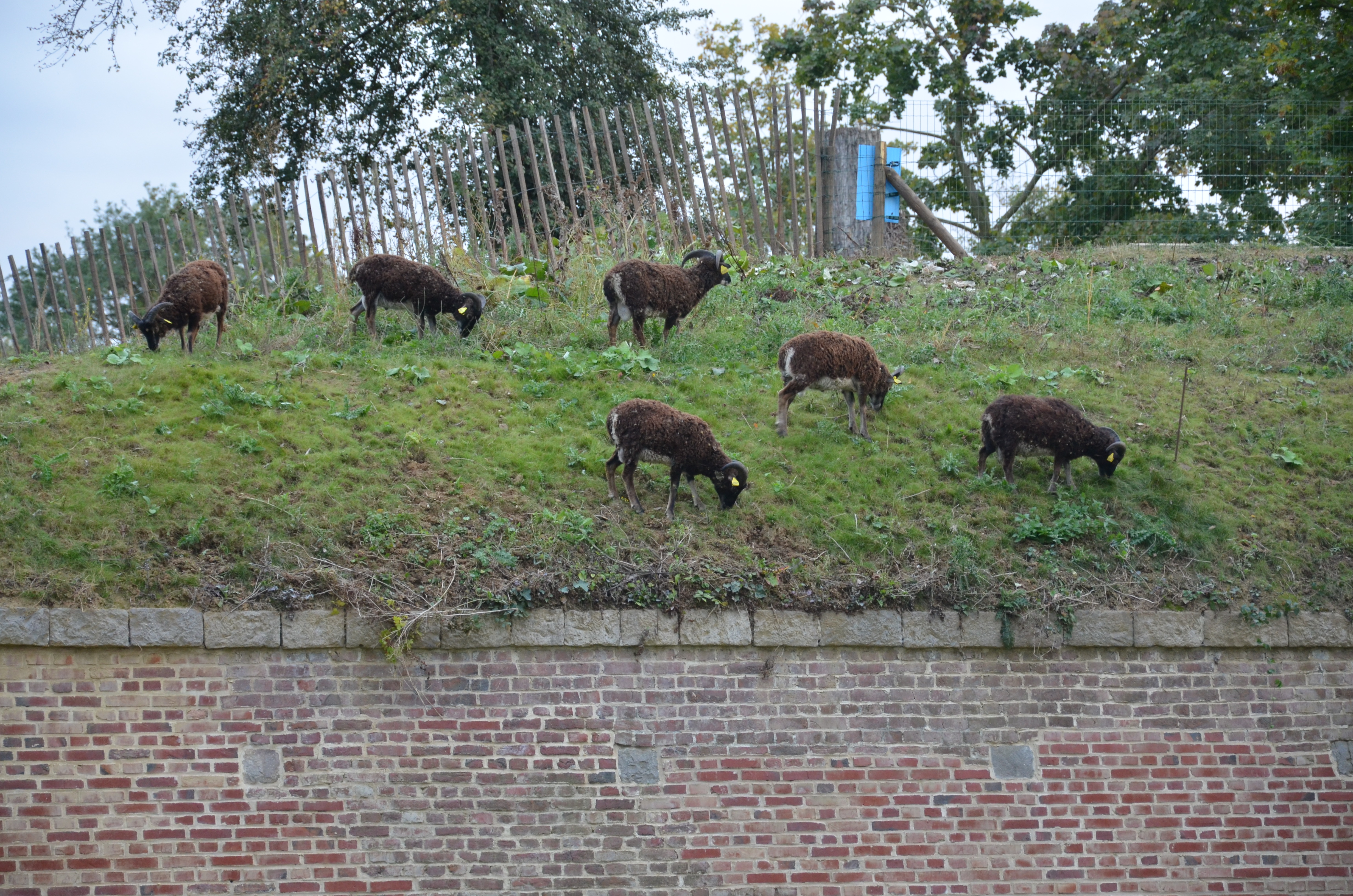 Moutons de Soay utilisés par la ville de Lille pour la gestion restauratoire de la végétation couvrant le sommet d'une partie des fortifications (citadelle de Lille, construite par Vauban). Ce petit mouton, léger et rustique, très à l'aise sur les pentes remplace idéalement les engins mécaniques. Il joue aussi un rôle de corridor écologique ambulant en transportant des graines et propagules dans son pelage, son tube digestif et sous ses sabots.